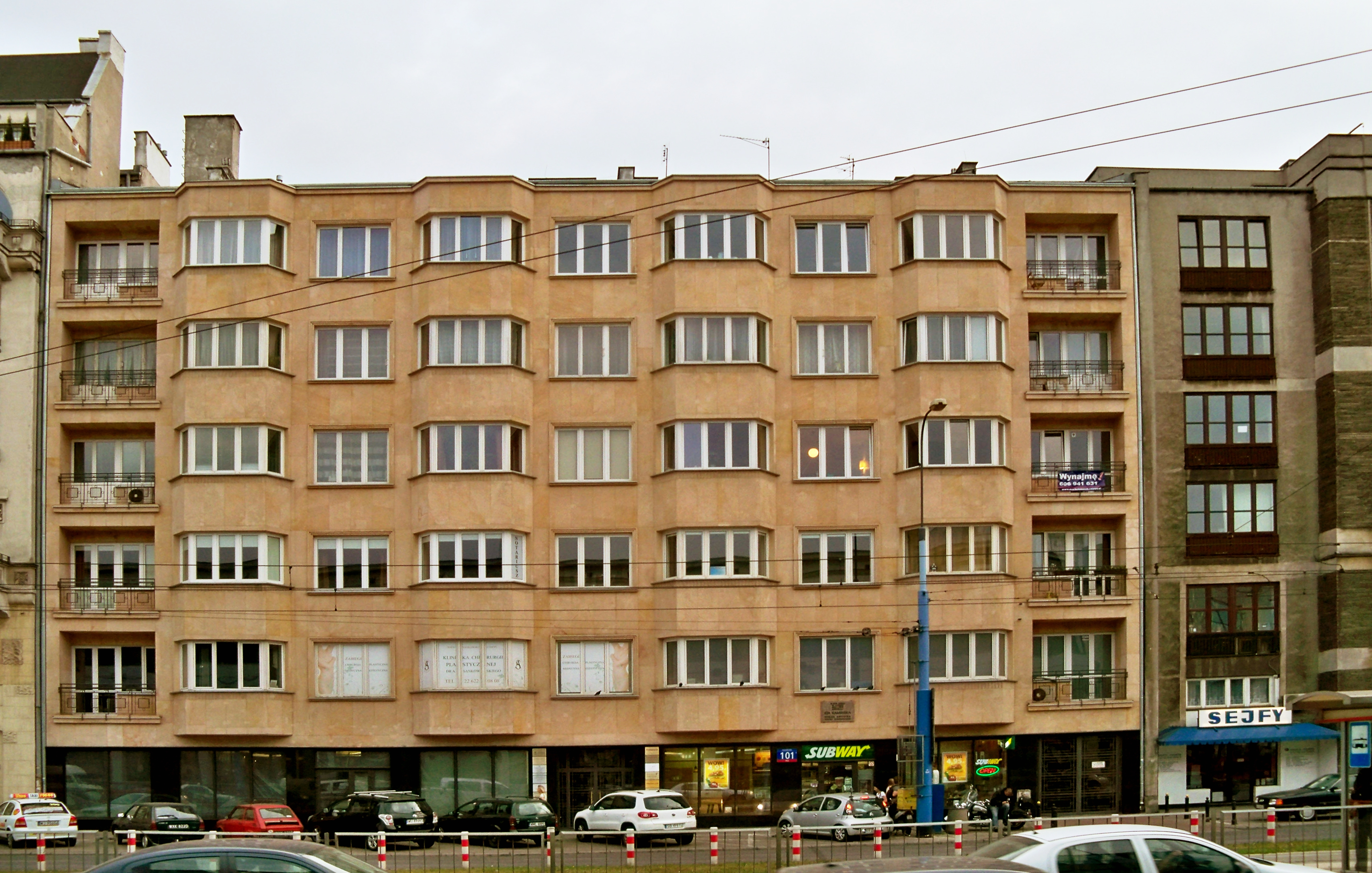 Kamienica Gustawa Pala w Warszawie.